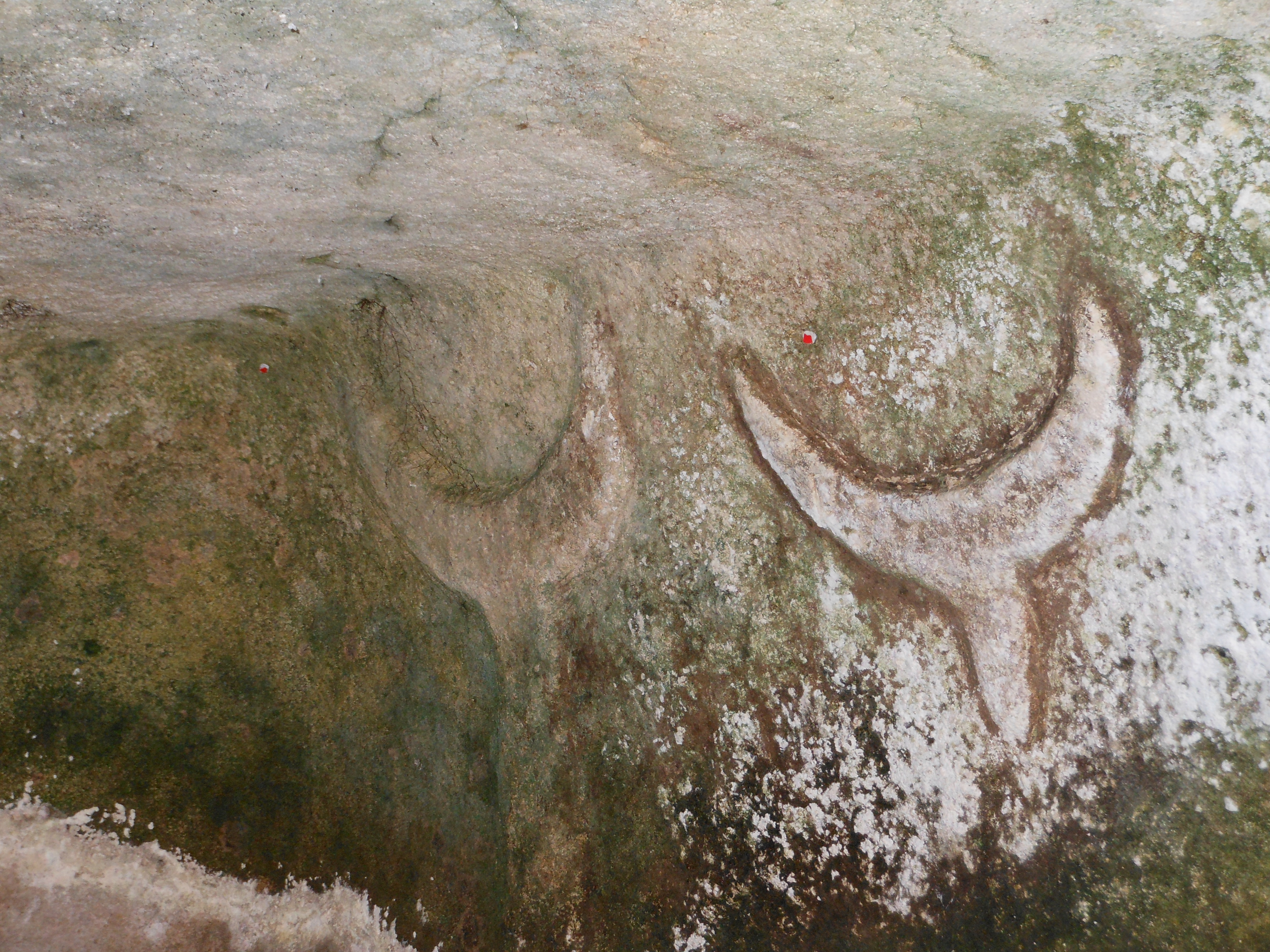 Porto Torres - Necropoli ipogeica di Su Crucifissu Mannu